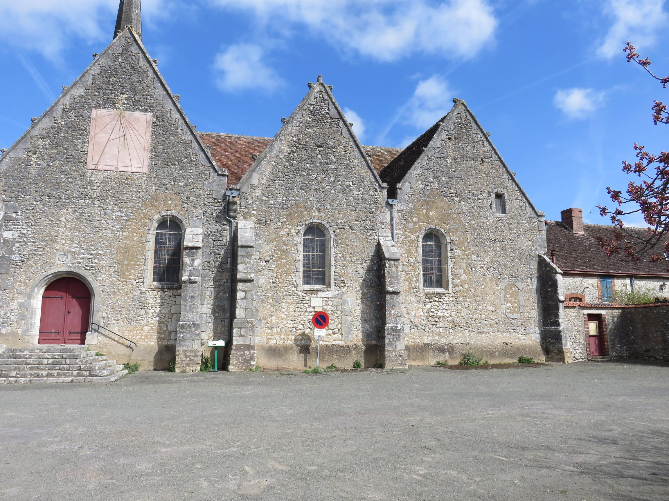 Village de Morier, Eglise